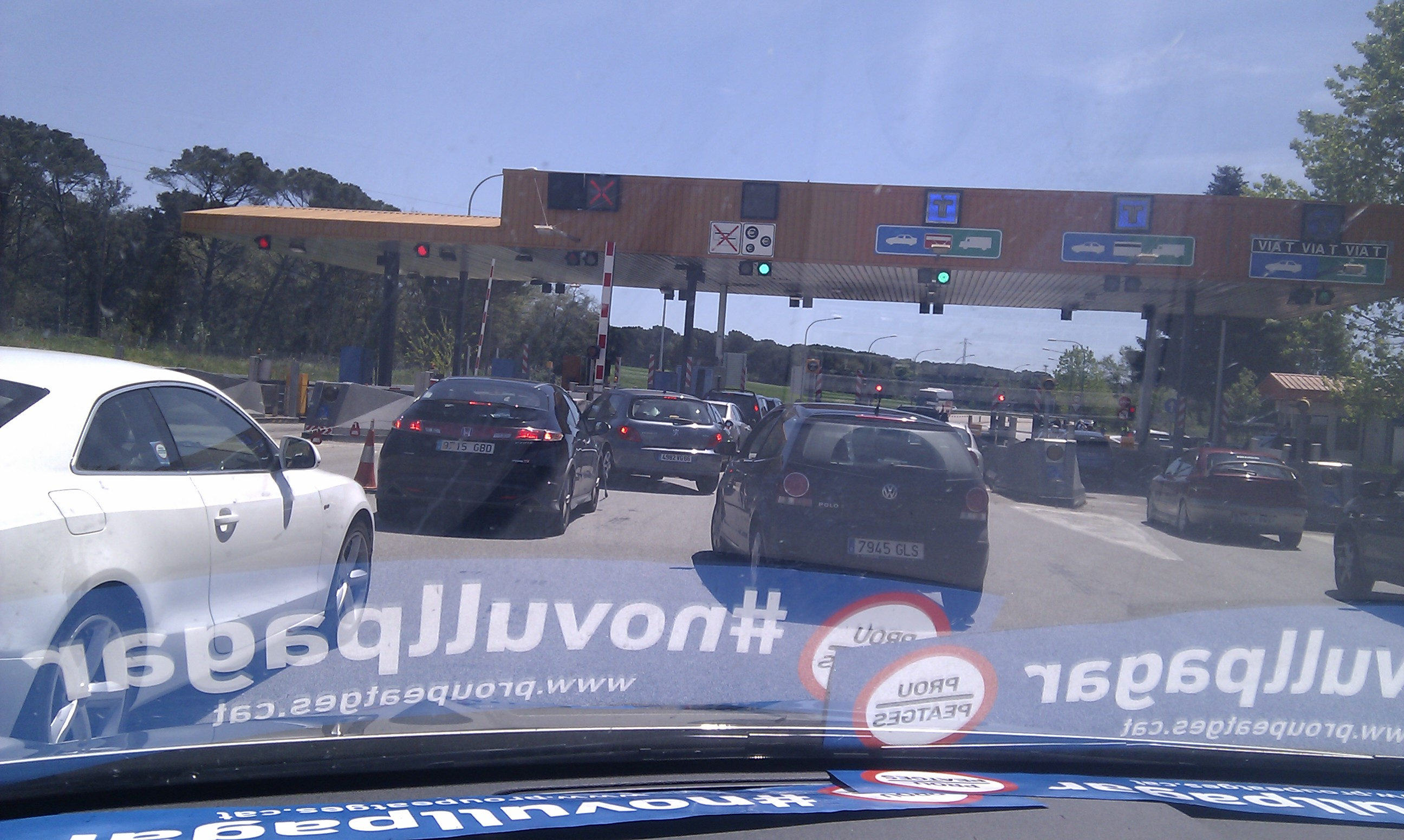 Vista interior vehicle